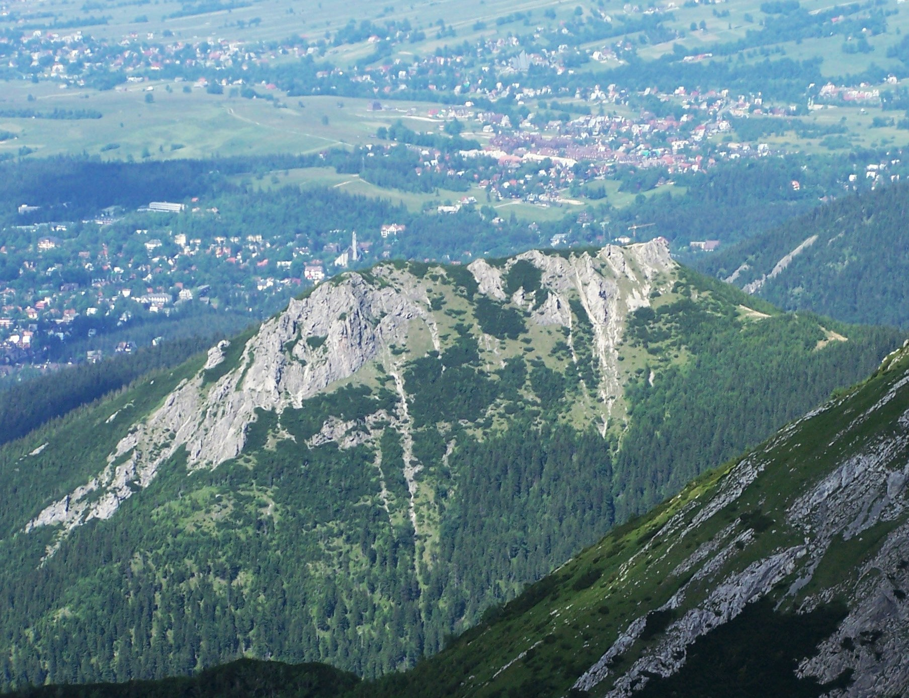 Sarnia Skała (West Tatra Mountains). View from Czerwony Grzbiet